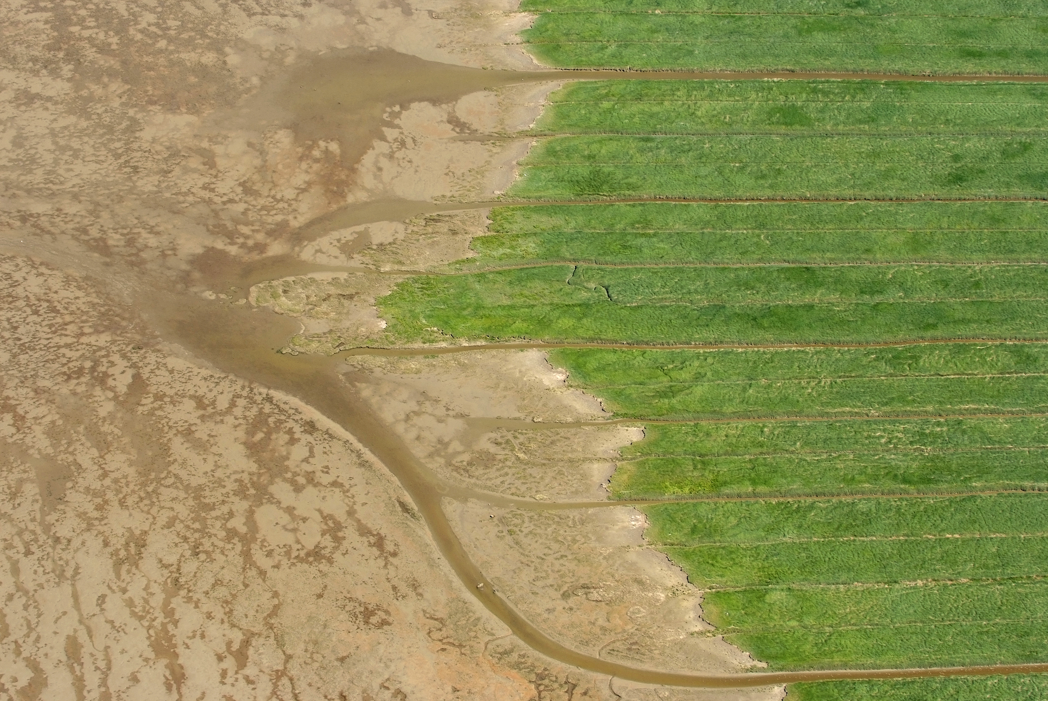 Übergang der Salzwiesen bei Augustgroden ins Watt (Fotoflug vom Flugplatz Nordholz-Spieka über Cuxhaven und Wilhelmshaven)